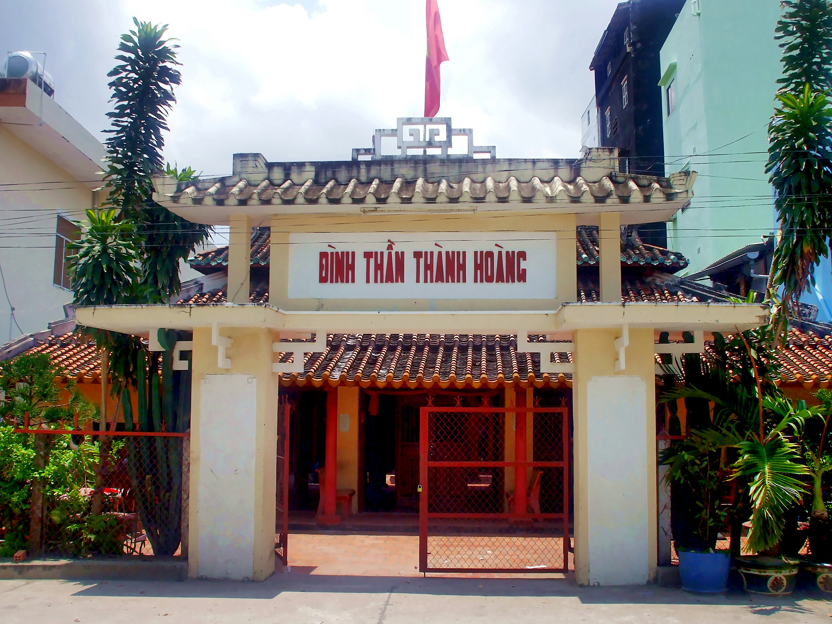 Đình thần Thành hoàng xã Mỹ Đức xưa, nay thuộc khu phố 1, p. Đông Hồ, thị xã Hà Tiên (Kiên giang, Việt Nam). Đình này do chí sĩ Nguyễn Thần Hiến cùng với nhân dân địa phương khởi sự kiến tạo năm 1888.